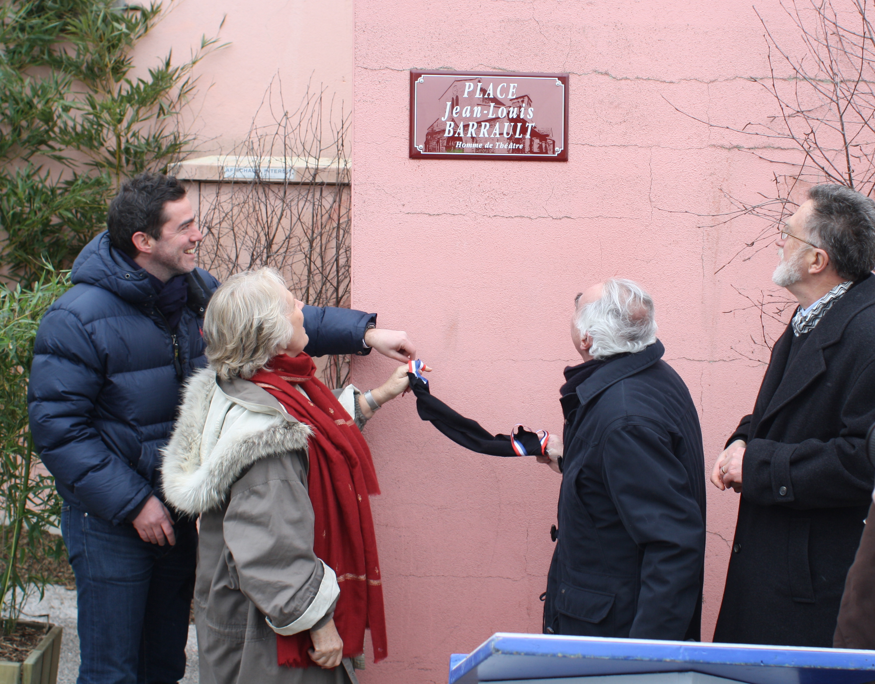 Marie-Christine Barrault (à gauche) inaugure la place Jean-Louis Barrault à Tournus (France). Cette place est située à proximité immédiate du Madeleine Palace, salle de spectacle inaugurée en 1955 par la compagnie de Jean-Louis Barrault.